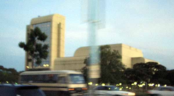 Хараре, хотел Шератон, снимљено 22. марта 2005, Аутор Радован Корда